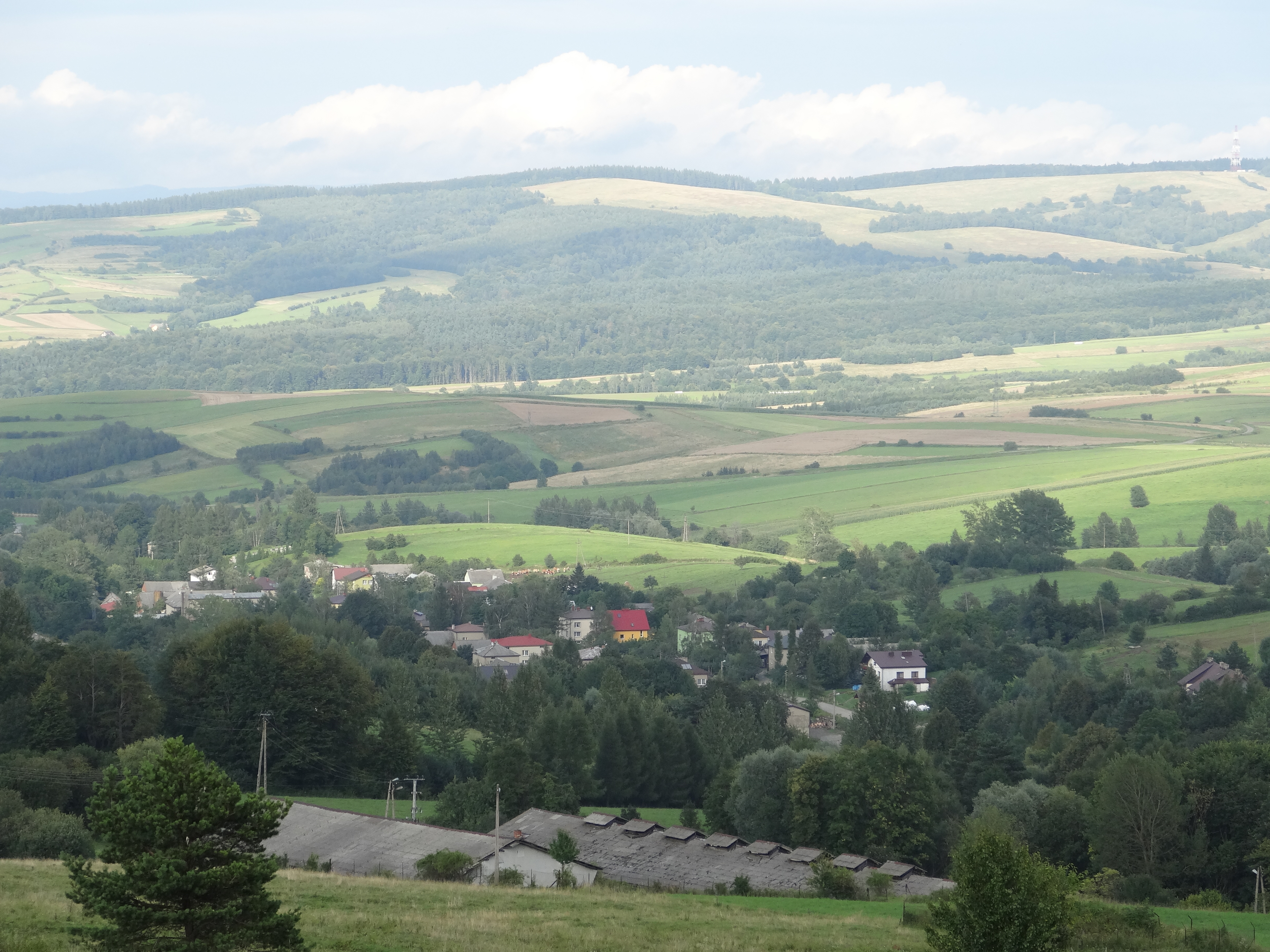 Widok na Wolę Piotrową z drogi na Tokarnię